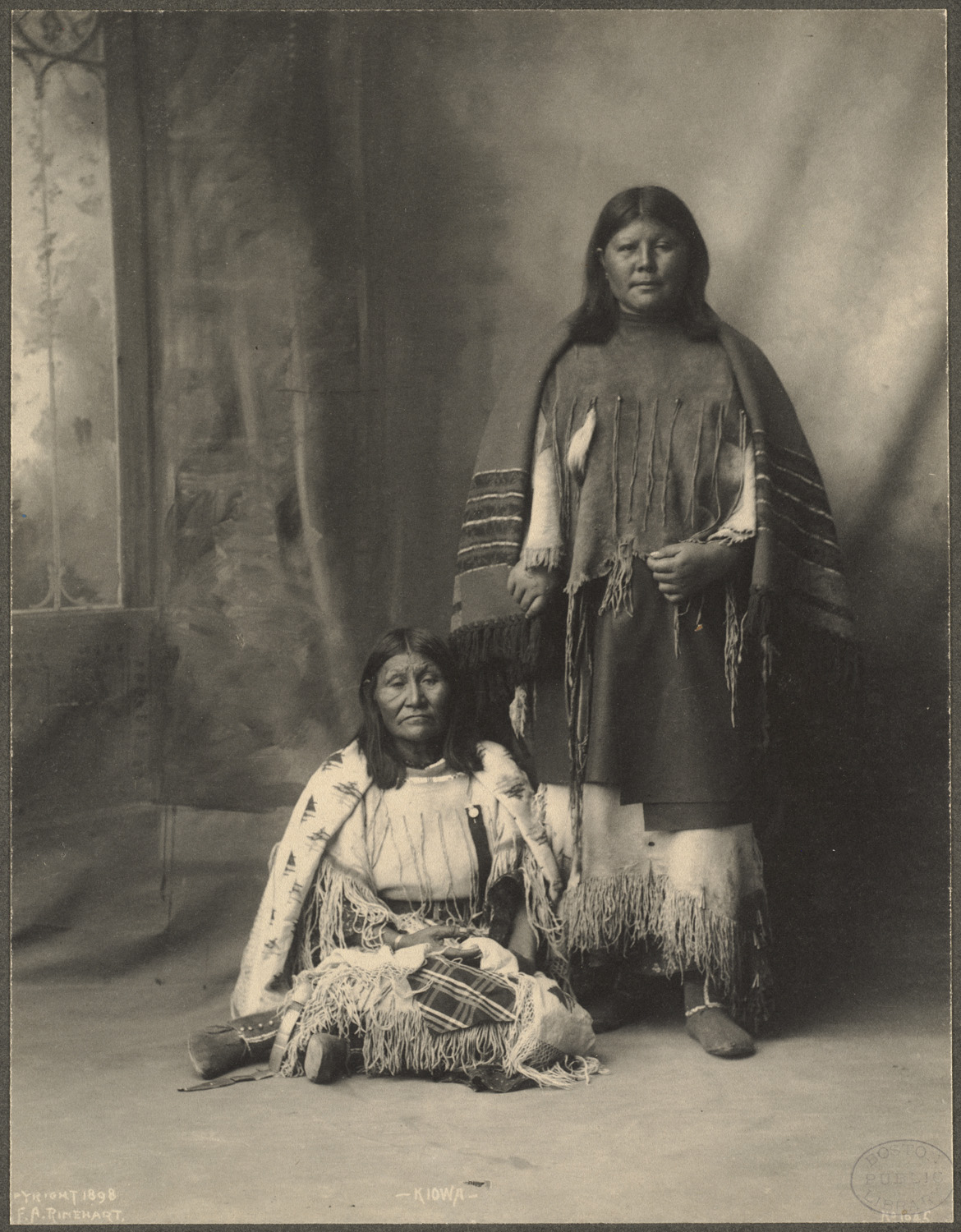 Two Kiowa women.